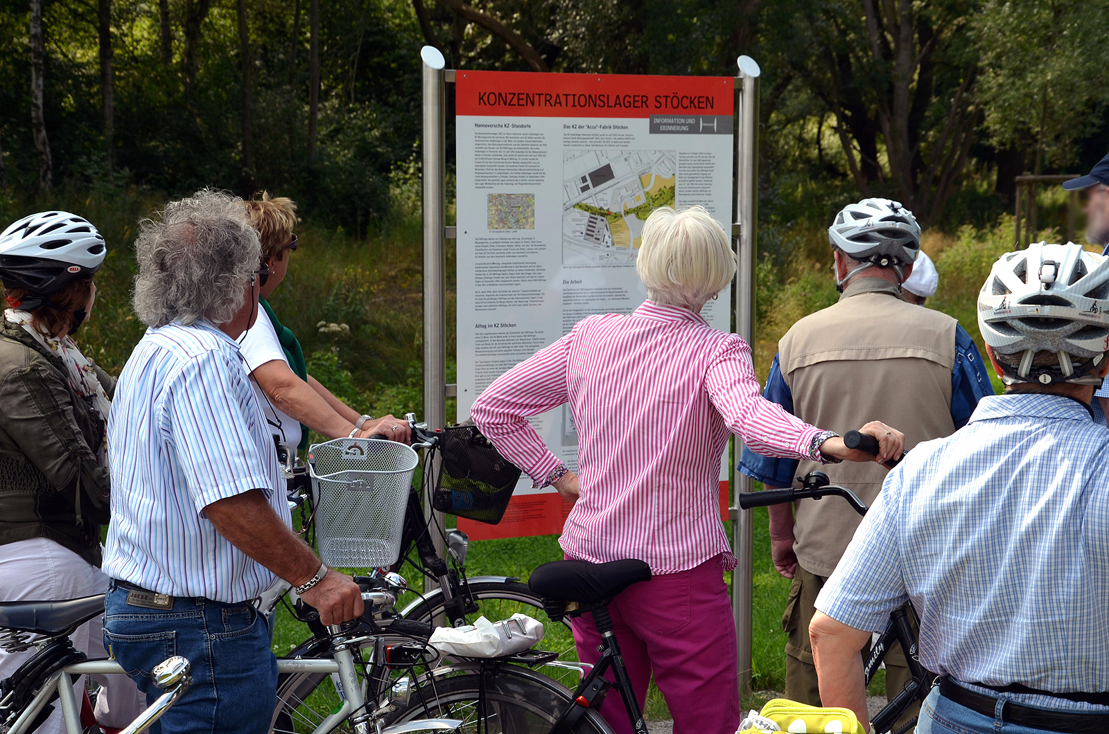 Auf dem Rückweg einer geführten Fahrradtour durch das Landschaftsschutzgebiet Mittlere Leine (Ausgangspunkt war das Eingangstor an der Herrenhäuser Allee am Königsworther Platz in Hannover) bogen die Teilnehmer nach der Besichtigung des Hinüberschen Gartens ab, um die wenige Wochen zuvor eingeweihte Gedenktafel zum Konzentrationslager Stöcken zu studieren ...